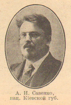 Депутат Государственной думы Российской империи IV созыва Анатолий Савенко (1875-1922). Фото из журнала "Искра", 1914 год